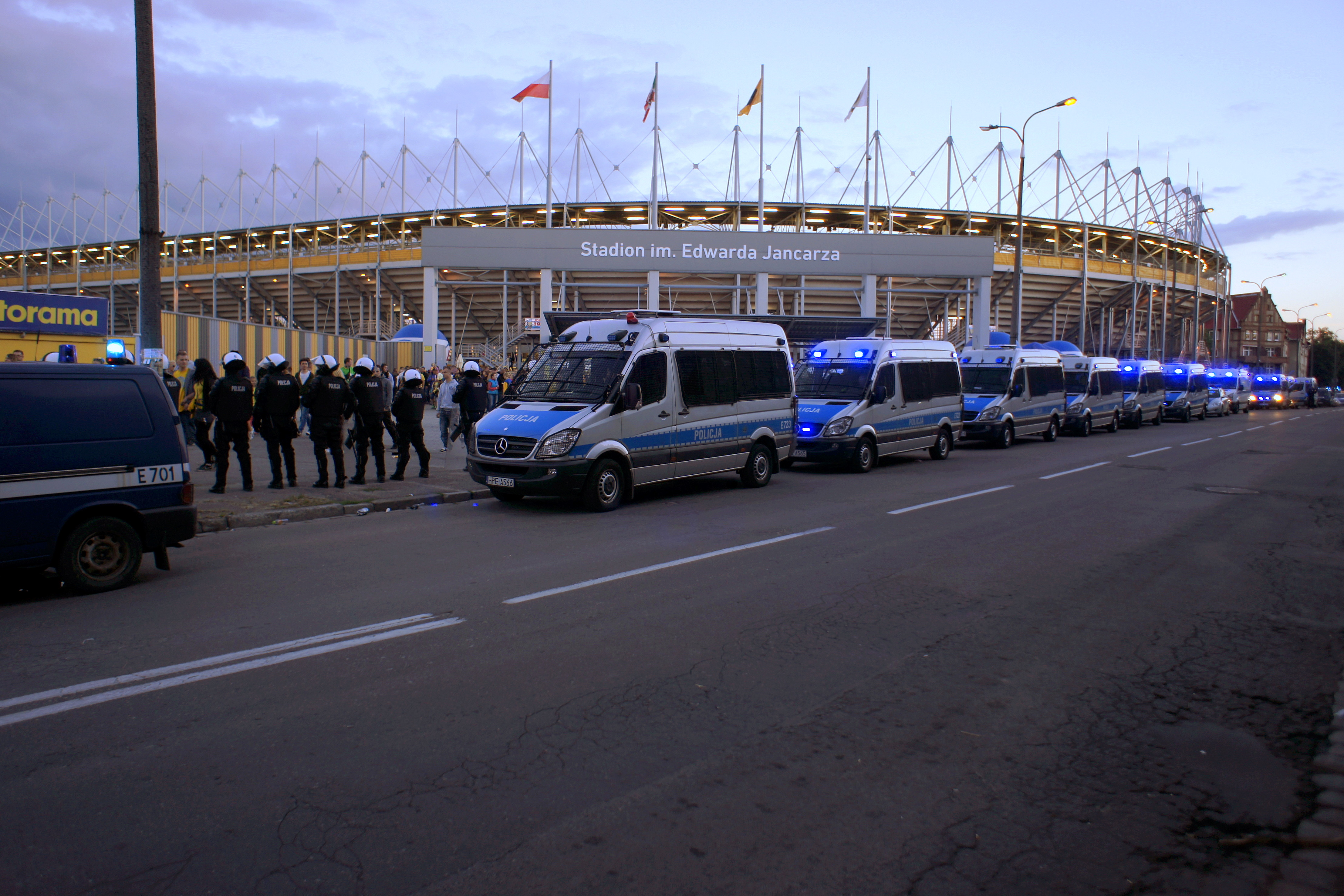 Derby żużlowe są imprezą podwyższonego ryzyka, stąd wymagane jest wsparcie policji. Gorzów Wlkp., stadion im. Jancarza, 22. 06. 2014 r.